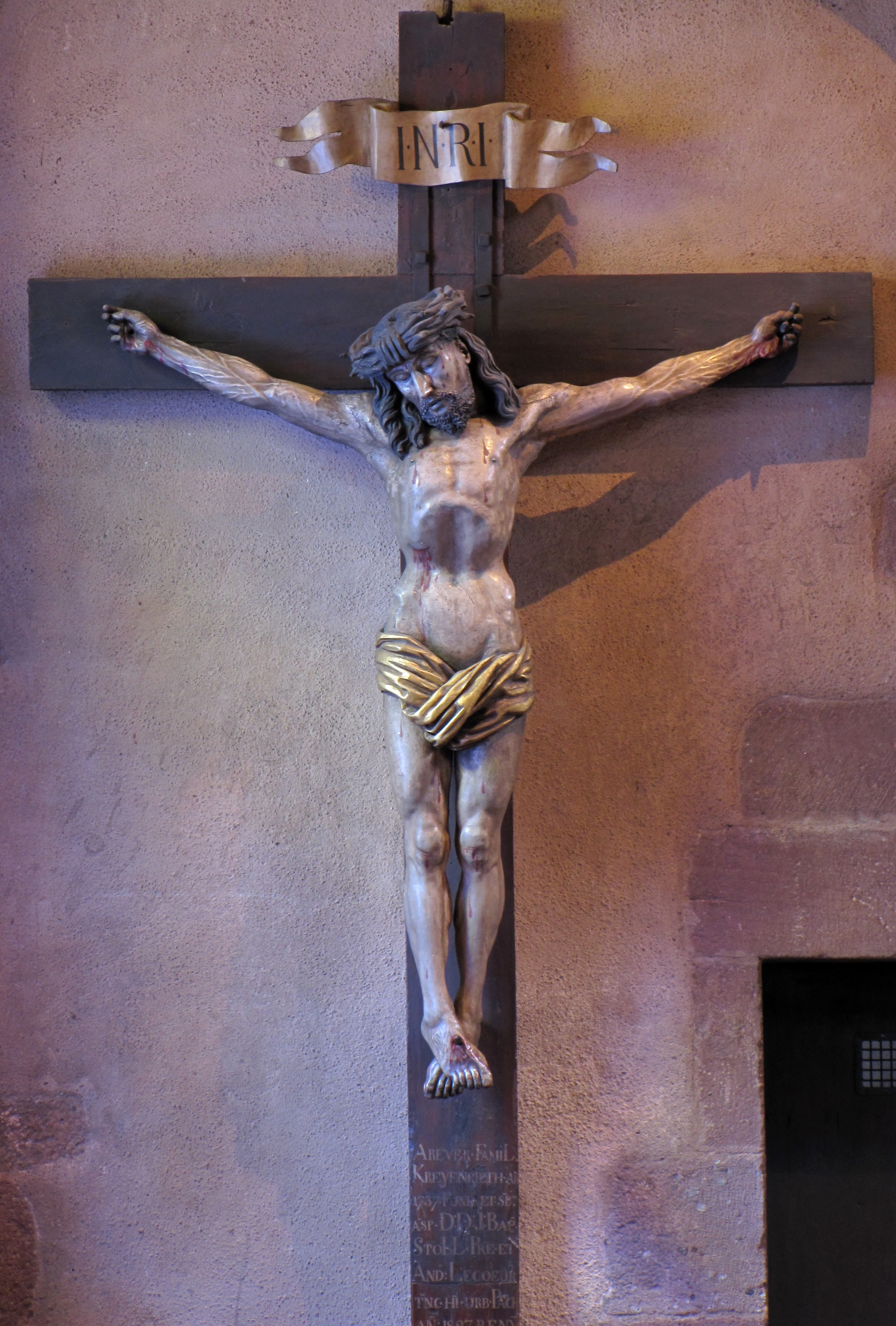 Alsace, Haut-Rhin, Église Saint-Léger (XIIIe) de Guebwiller (PA00085440, IA00054831).Christ en croix (1737): This object is classé Monument Historique in the base Palissy, database of the French furniture patrimony of the French ministry of culture, under the references PM68000096 and IM68000314.